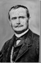 Porträtfotografie von Josef von Schmitt (1817–1890)